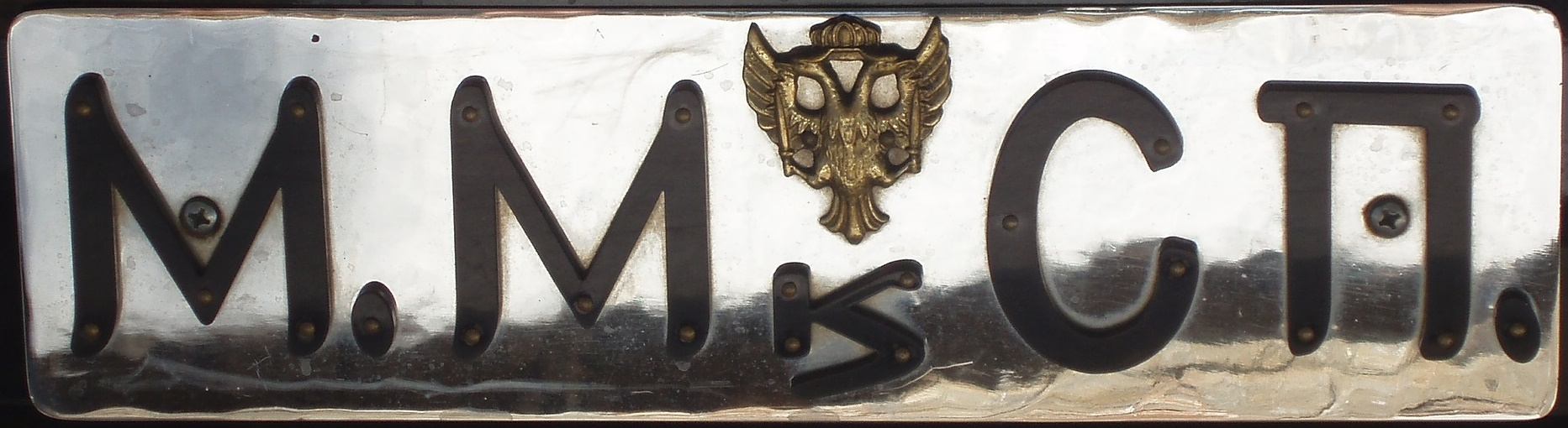 Kfz-Kennzeichen am Auto des Metropoliten von Monemvasia und Sparta, gesehen in Kythira